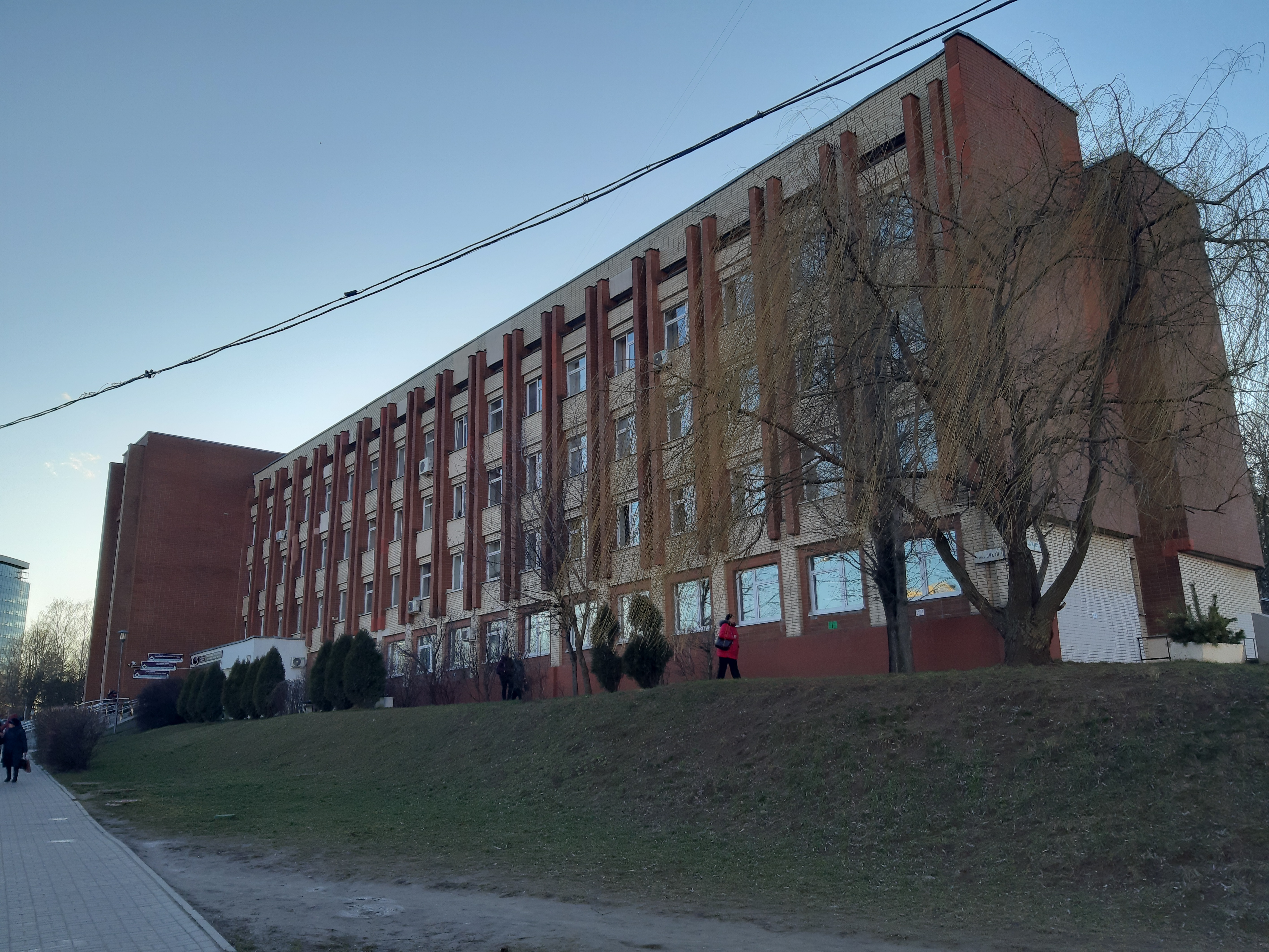 Мінск. Ад Маладзёжнай да Нямігі